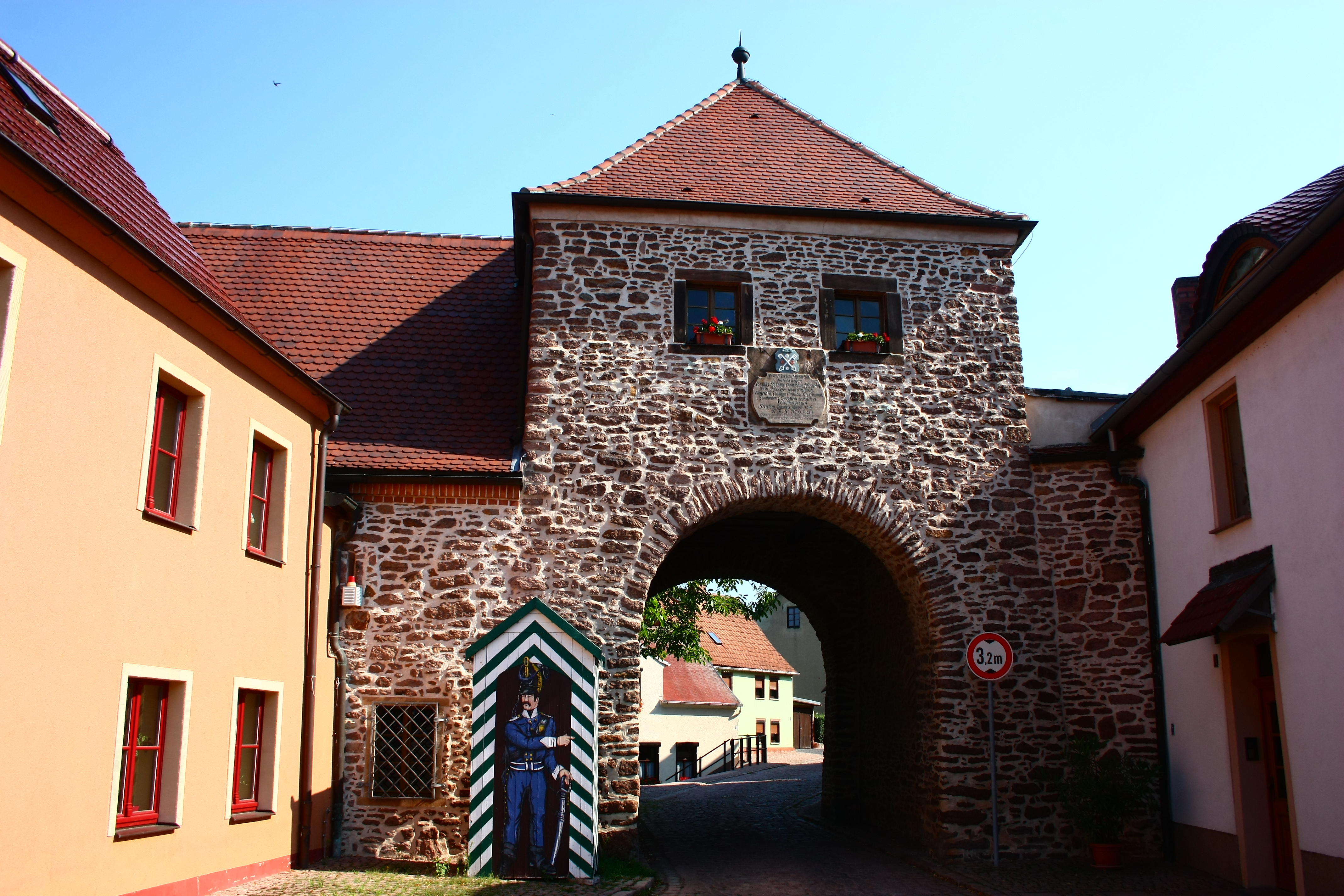 das hallesche Tor in Löbejün